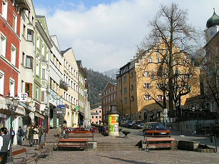 Unterer Stadtplatz in Kufstein (Tirol)